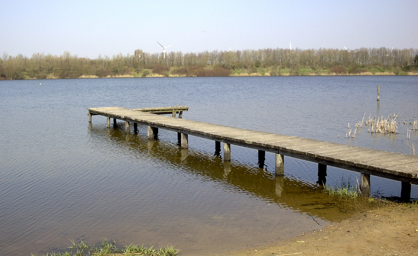 Wassersteg